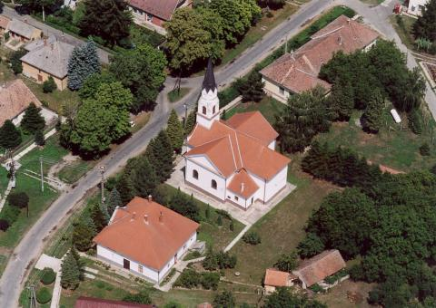 Gyékényes, Hungary, aerialphotography. Szent József római katolikus templom